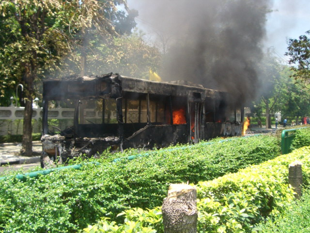 The last barricade before the podium at government house, Phitsanulok road (Bangkok, Thailand); 14 April 2009